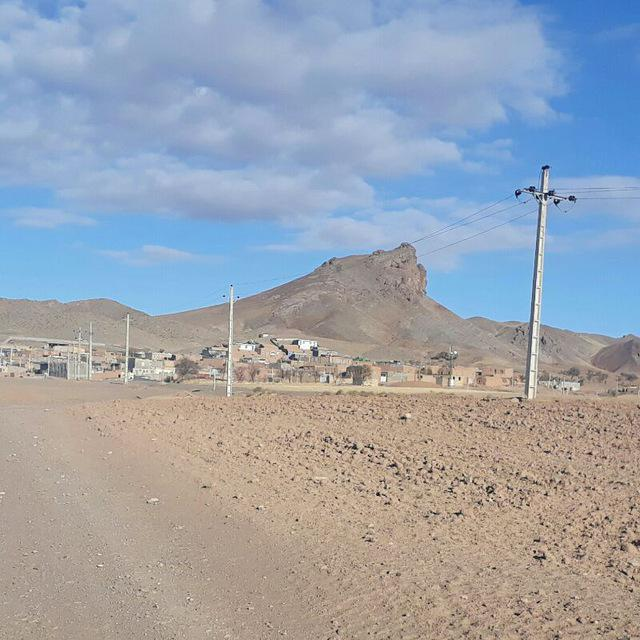 روستای برون پاییز 1396